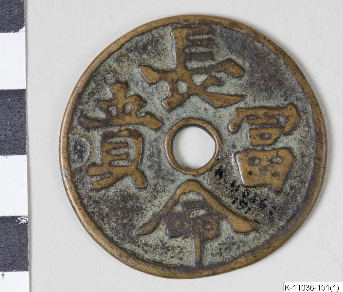 Amulettmynt. Runt hål i mitten. Dekor i relief på båda sidorna. K-11036-151 China.